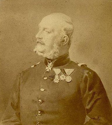 Foto van George V van Hannover (1819-1878)